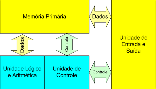 Visão simplificada da arquitetura de Von Neumann. Mirandés: Bison simplificada de l'arquitetura de von Neumann.